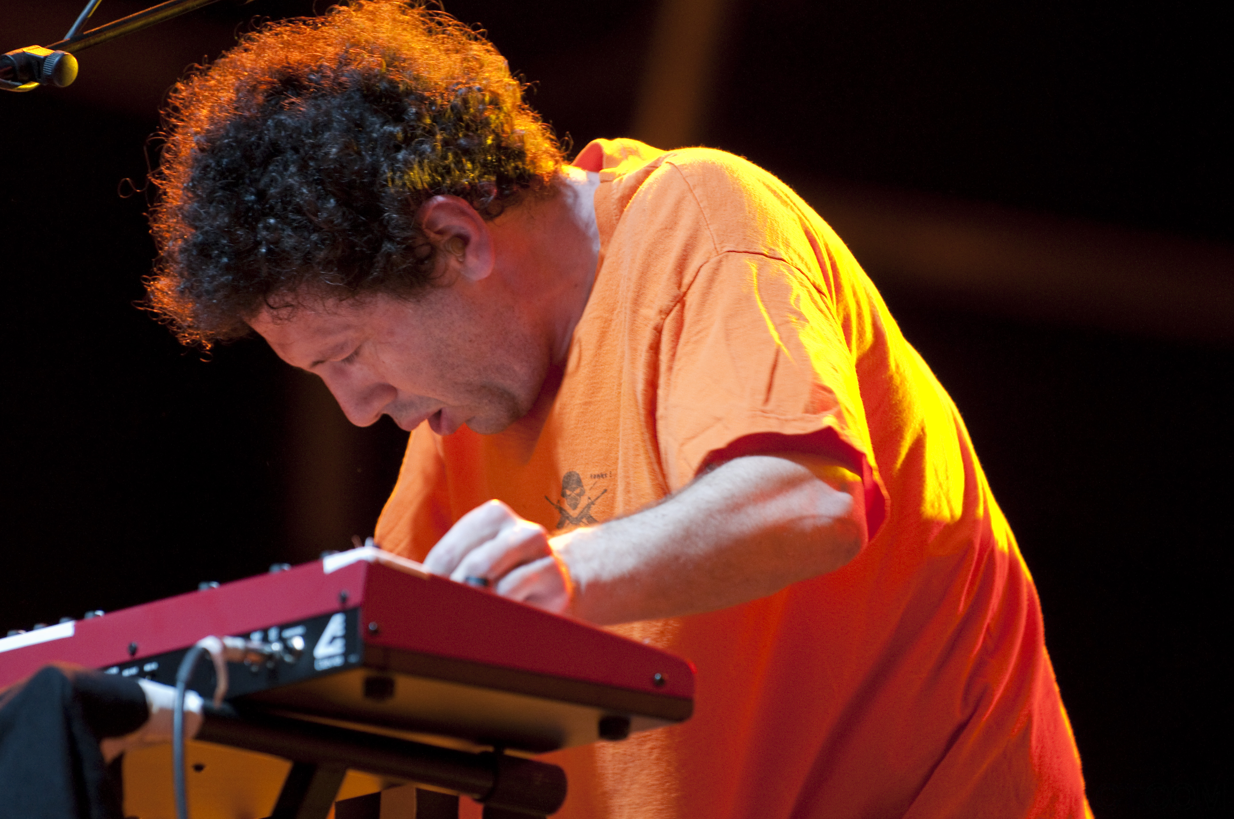 Yo La Tengo